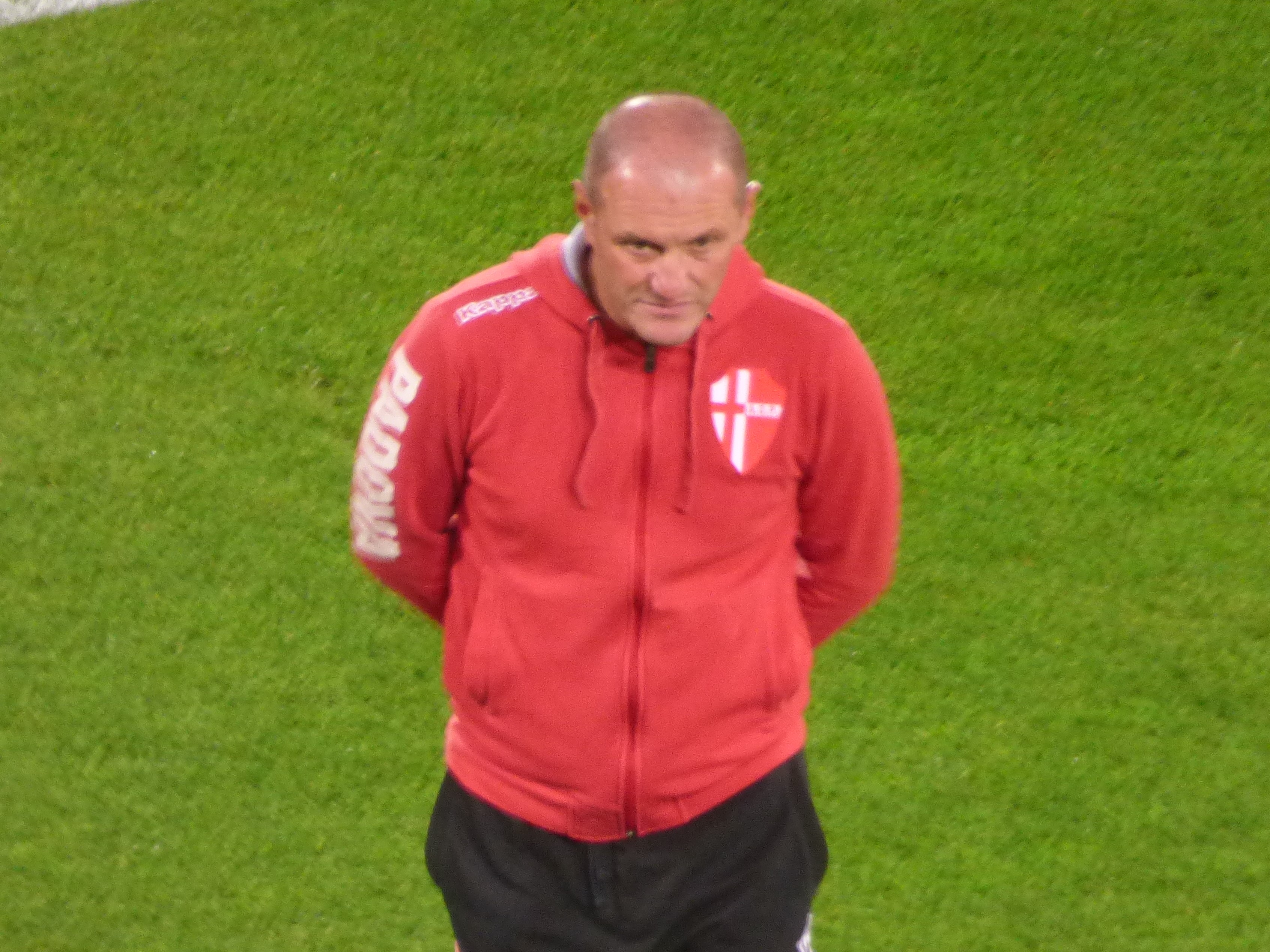 Pierpaolo Bisoli lors du match amical RC Lens - Calcio Padova, le 11 octobre 2018 au Stade Bollaert-Delelis de Lens.